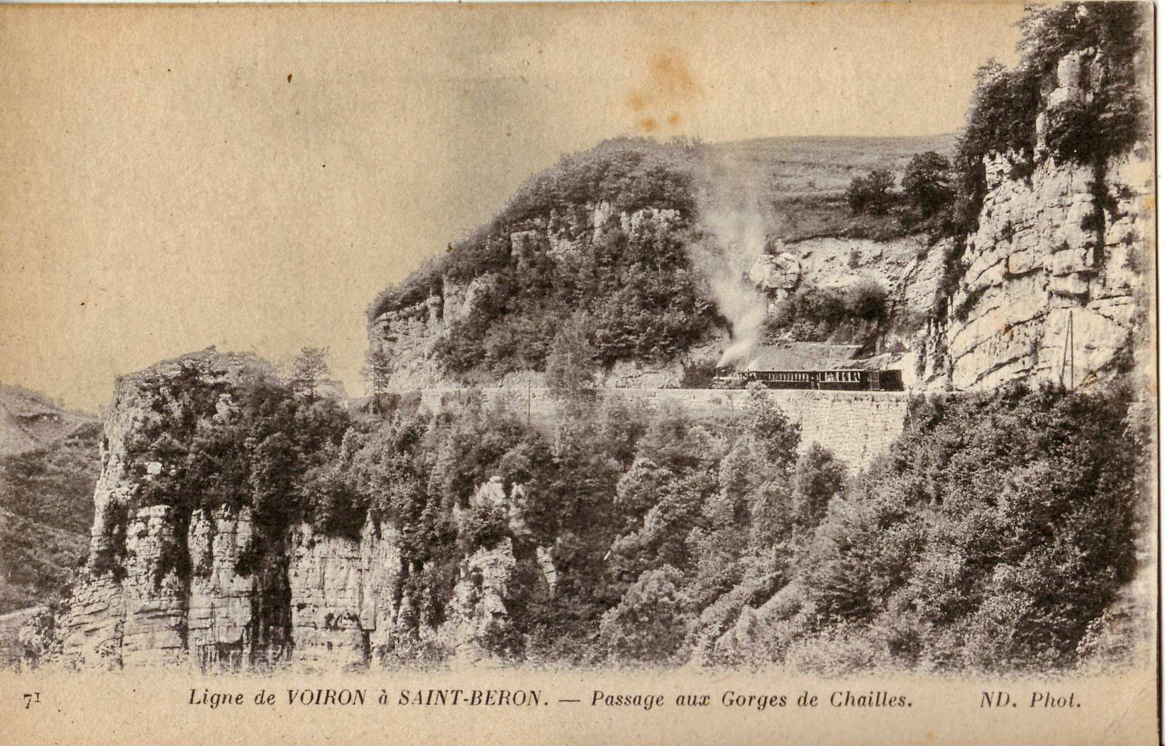 Carte postale ancienne éditée par ND, n°71 : Ligne de Voiron à Saint-Béron - Passage aux Gorges de Chailles